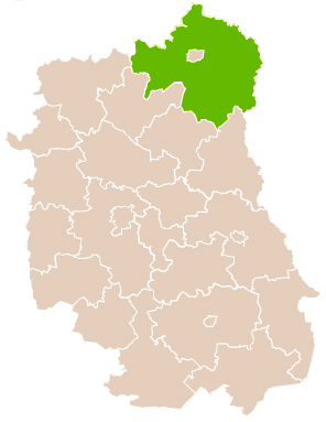 Map of Biała Podlaska county, Lublin voivodship Mapa powiatu bialskiego, województwo lubelskie